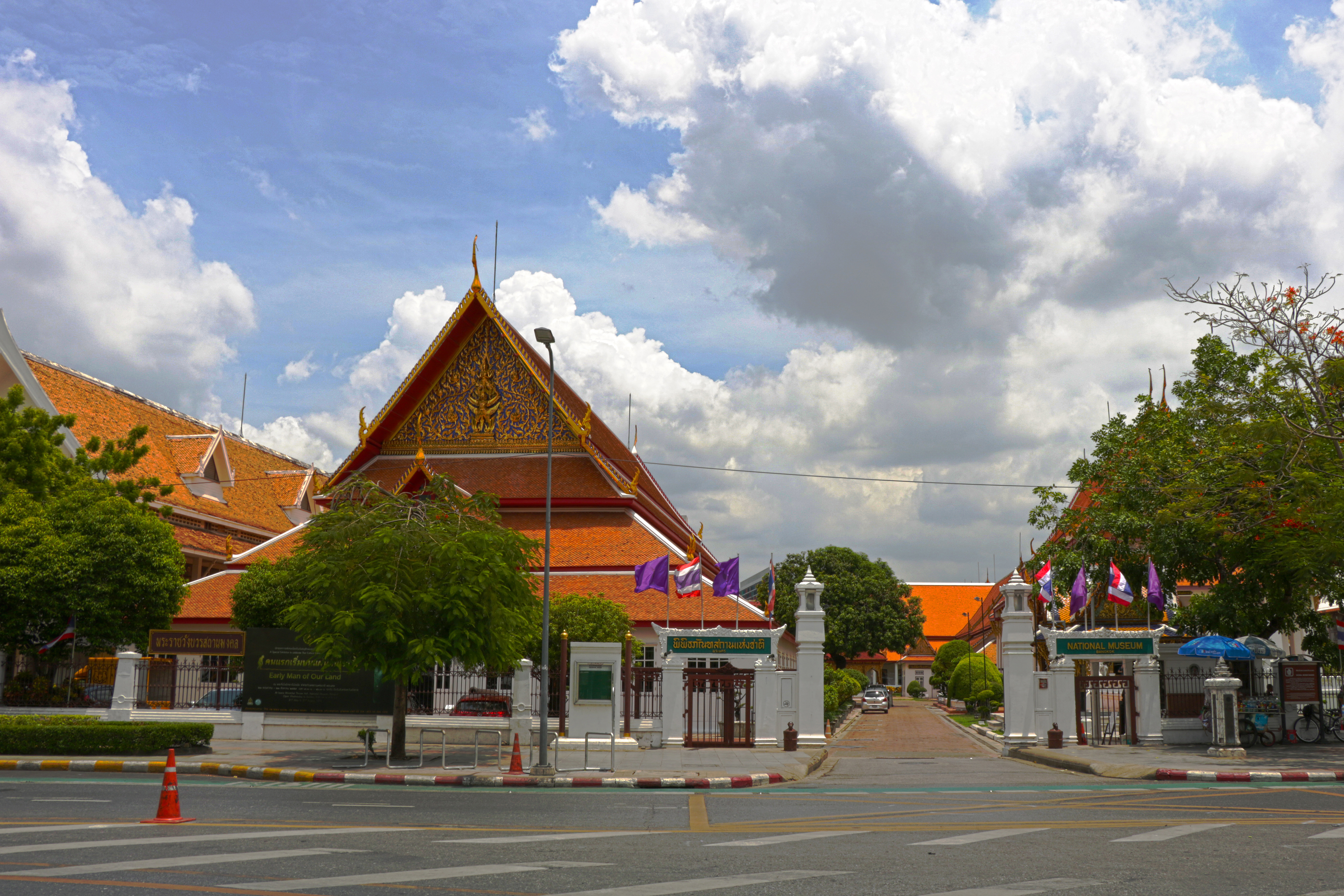 National Museum, Bangkok.